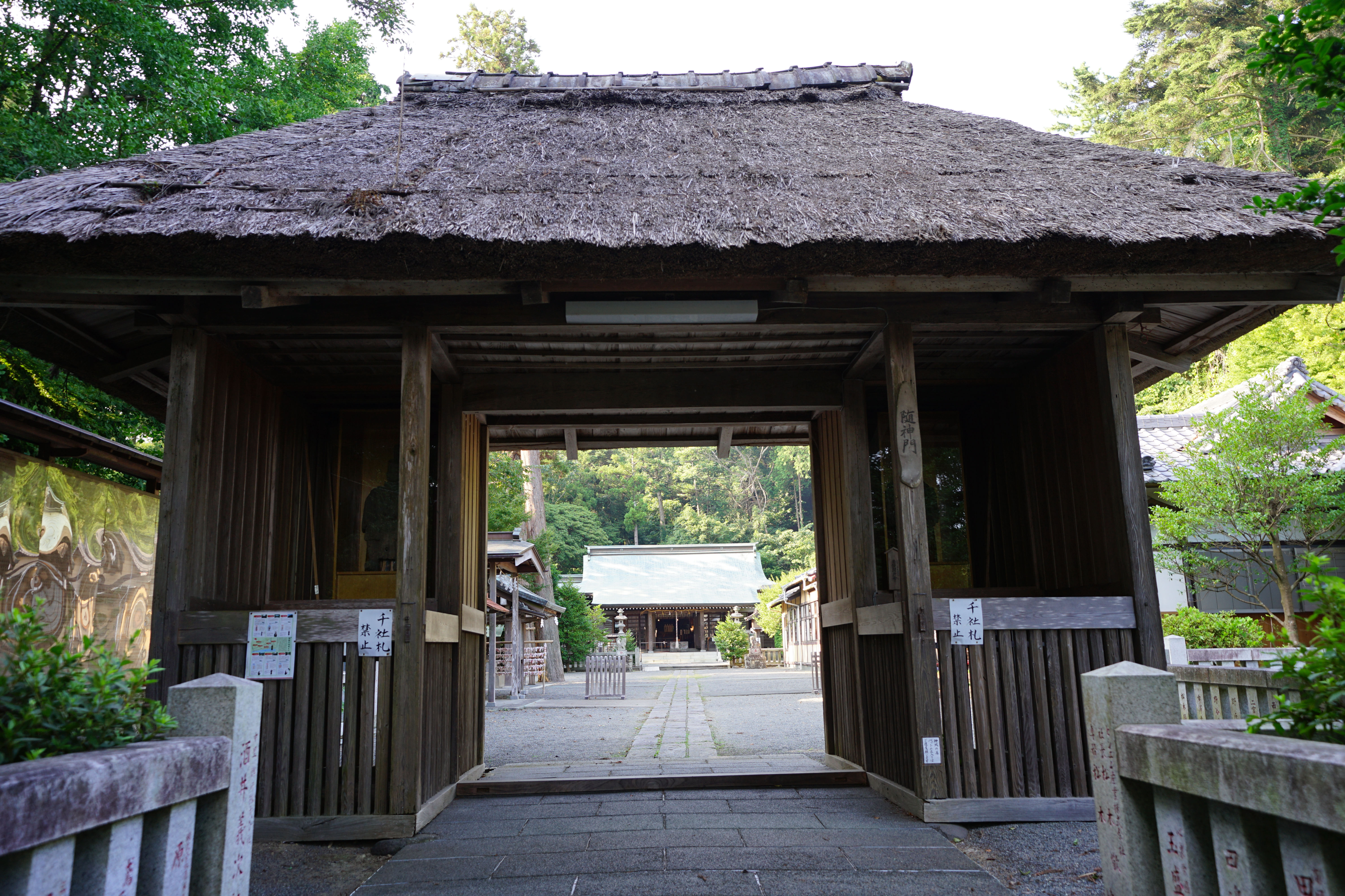 川勾神社の随神門（二宮町）